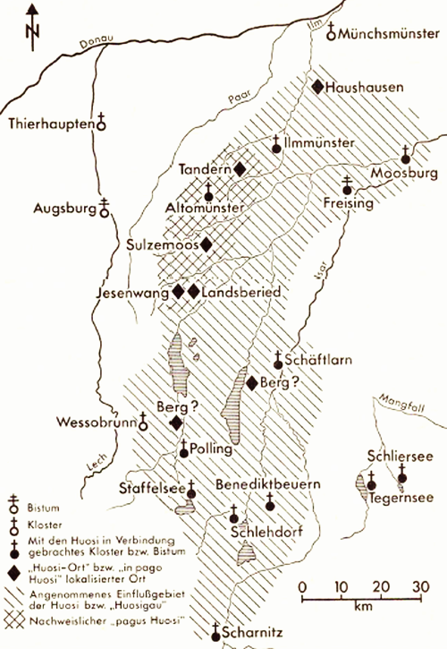 Ausdehnung des Siedlungsgebietes der Huosi